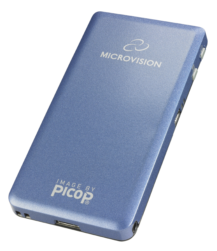 El Pico Proyector SHOWWXTM, que está disponible en 34 tiendas Telecor en toda España y grandes superficies de electrónica de consumo, es el único proyector de bolsillo con tecnología láser del mercado que puede conectarse a cualquier teléfono móvil que disponga de salida video, MP3 u ordenador portátil para proyectar, sin necesidad de ajustar el enfoque en ningún momento, imágenes de gran calidad de hasta 200”, en función de la luz ambiental. El Pico Proyector combina sistemas bidimensionales microelectromecánicos (MEMS) con tecnología de luz que incluye láser rojo, azul y verde, lentes y que componen un módulo proyector para dispositivos móviles de todo tipo. La clave del Pico Proyector SHOWWXTM es un espejo bidireccional, que incluye en su interior, y que oscila vertical y horizontalmente para capturar y reproducir imágenes píxel por píxel. Gracias a este sistema se logran imágenes brillantes, coloristas que se muestran de manera uniforme en cualquier superficie en la que se proyecte. Con tan sólo unas dimensiones de 14mmx60mmx118mm, similares a cualquier teléfono móvil, y un peso de 122 gramos, el Pico Proyector SHOWWXTM revolucionará el entorno profesional y del ocio a la hora de realizar presentaciones, proyectar películas, videos, imágenes o incluso conectarse a los mandos de las consolas de videojuegos logrando experiencias visuales únicas. El Pico Proyector SHOWWXTM, que se presentó en la pasada edición de la feria tecnológica CES de Las Vegas, recibió el apoyo de los usuarios al ser votado on line como el “Last Standing Gadget”, el dispositivo más innovador de toda la feria.